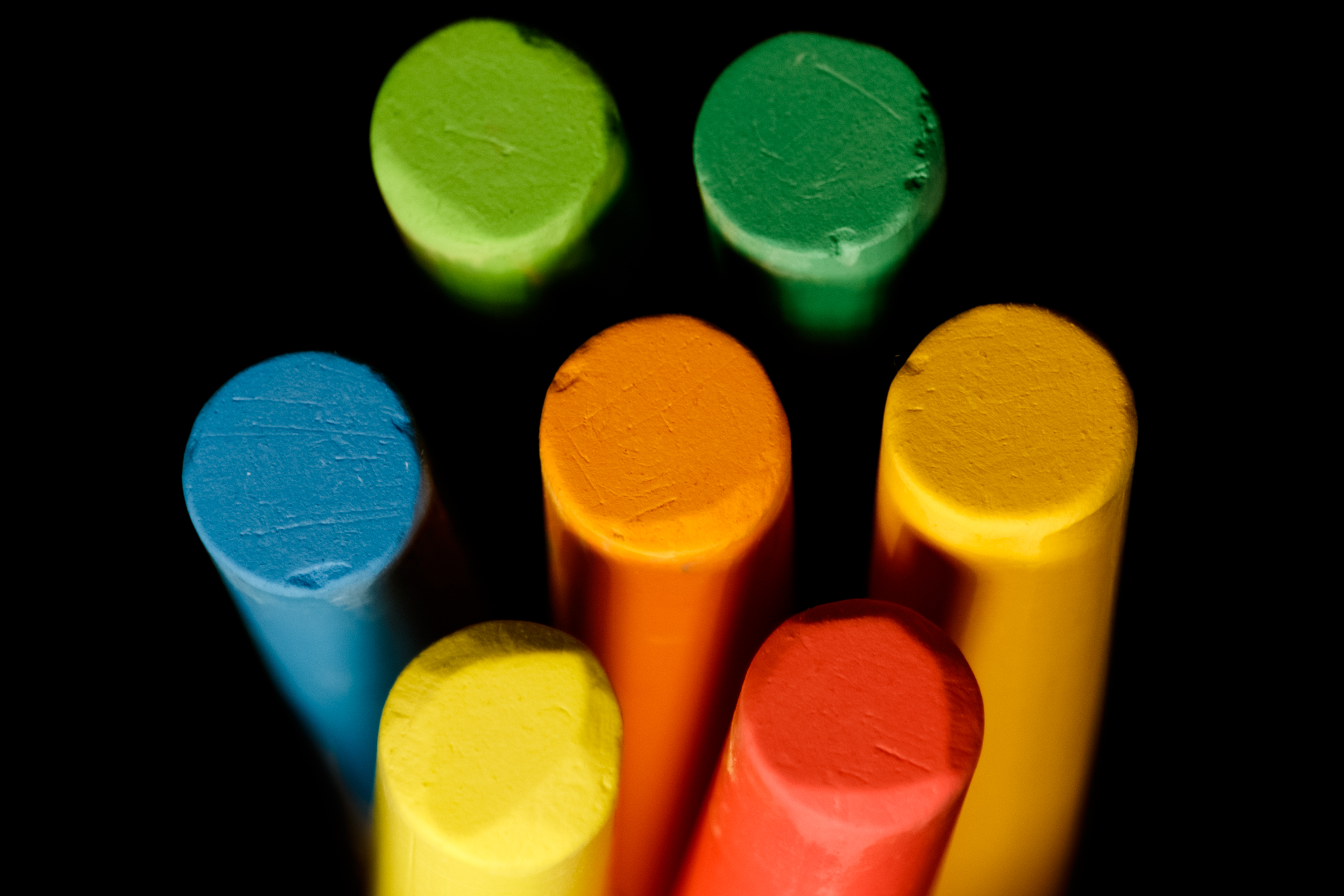 Chalks